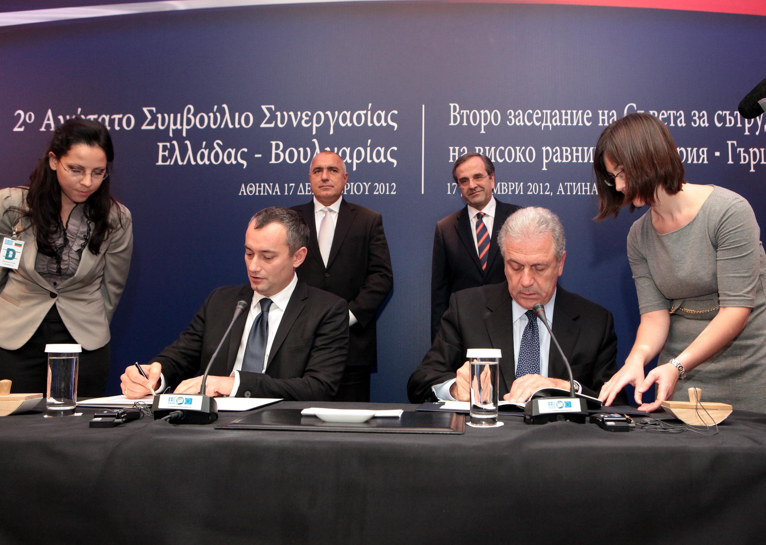 2o Ανώτατο Συμβούλιο Συνεργασίας Ελλάδας- Βουλγαρίας